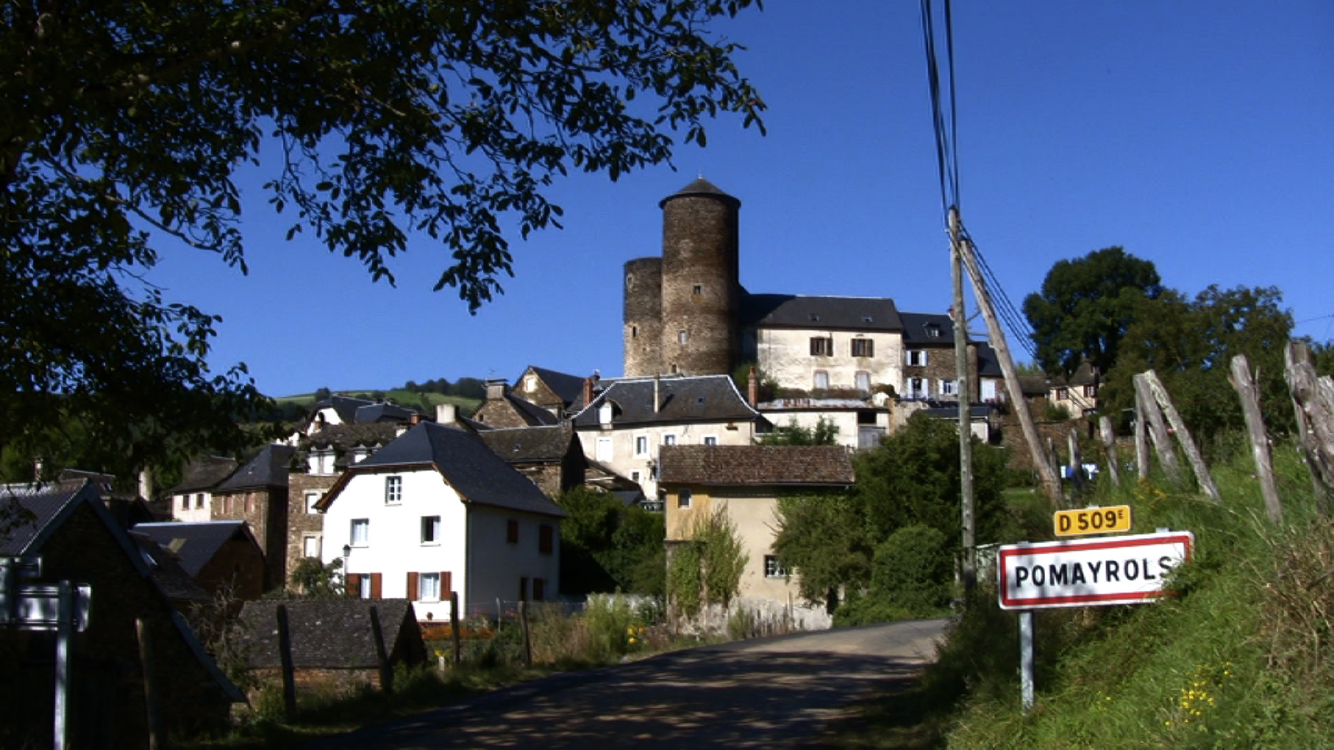 Pomayrols coté Est